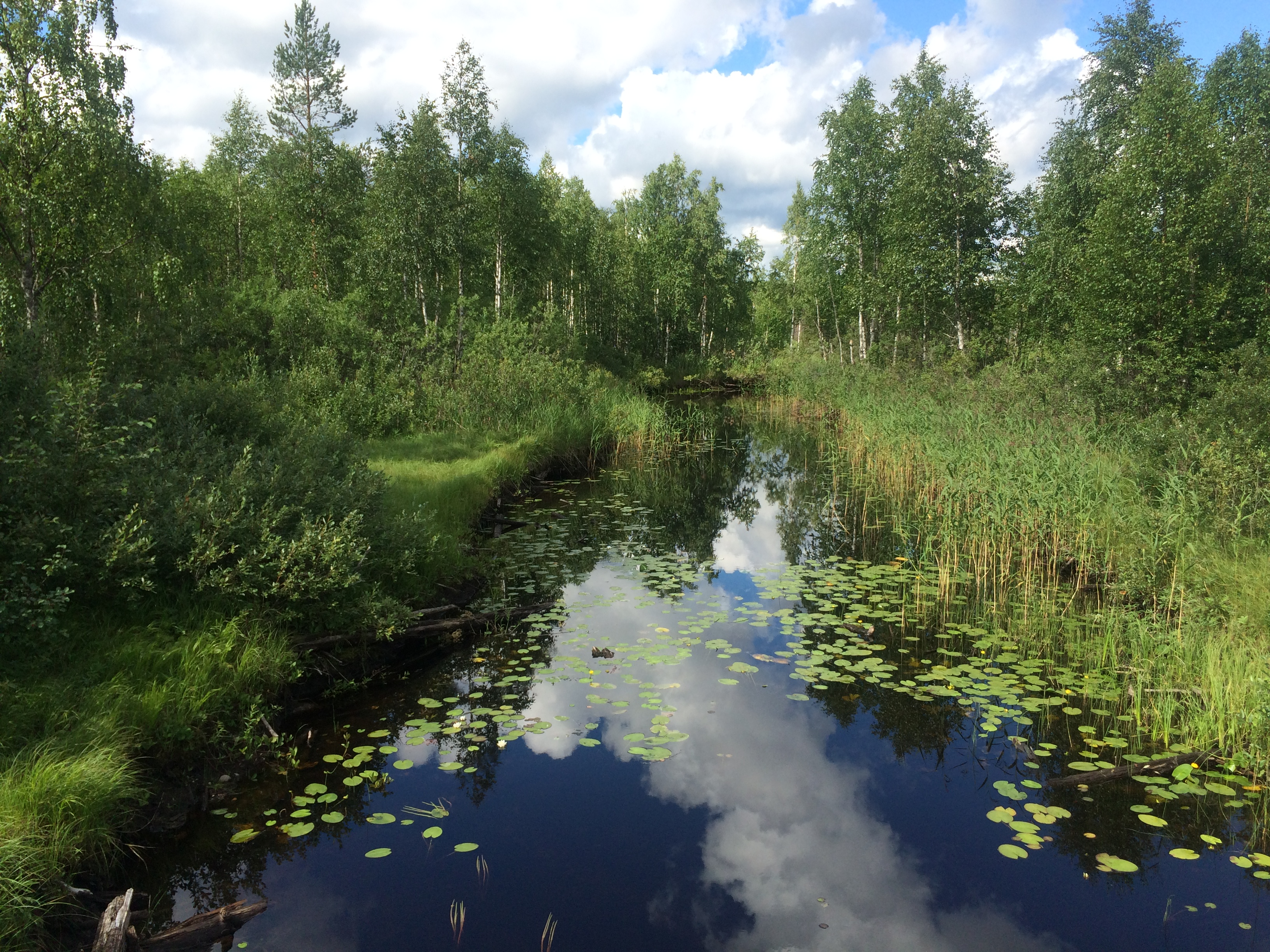 Няльма